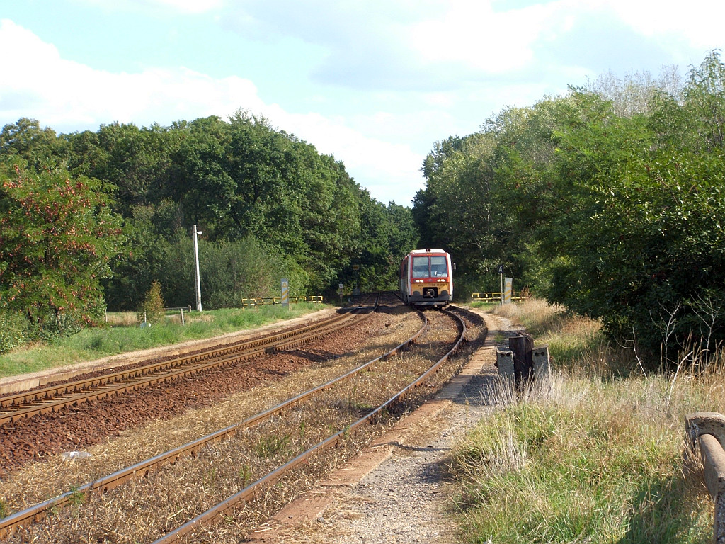 Bpmot személyvonat érkezik Szentes felől Hékéd megállóhelyre a 147. számú Kiskunfélegyháza–Szentes–Orosháza-vasútvonalon. A vonal itt párhuzamosan fut a 130. számú Szolnok–Makó-vasútvonallal